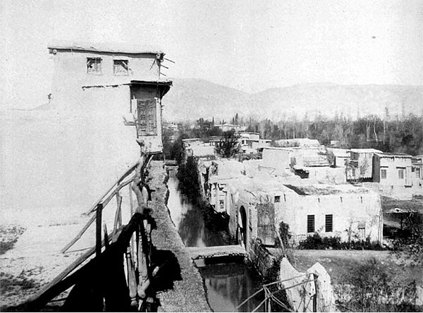 منطقة الفرابين في باب السلام فرانسيس 1900